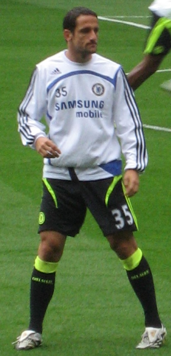 Belletti